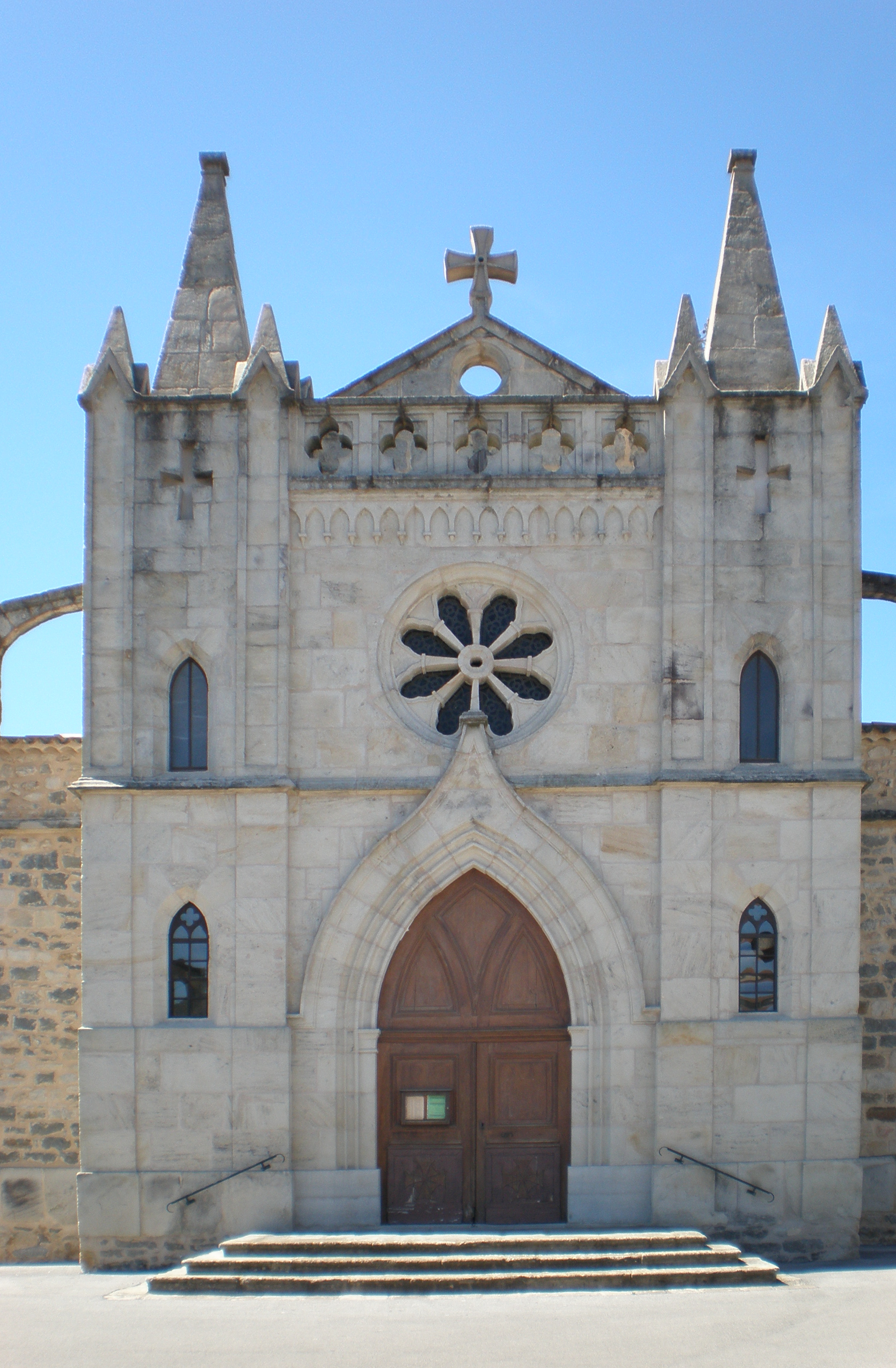 Eglise de Lachapelle sous Aubenas (Ardèche)